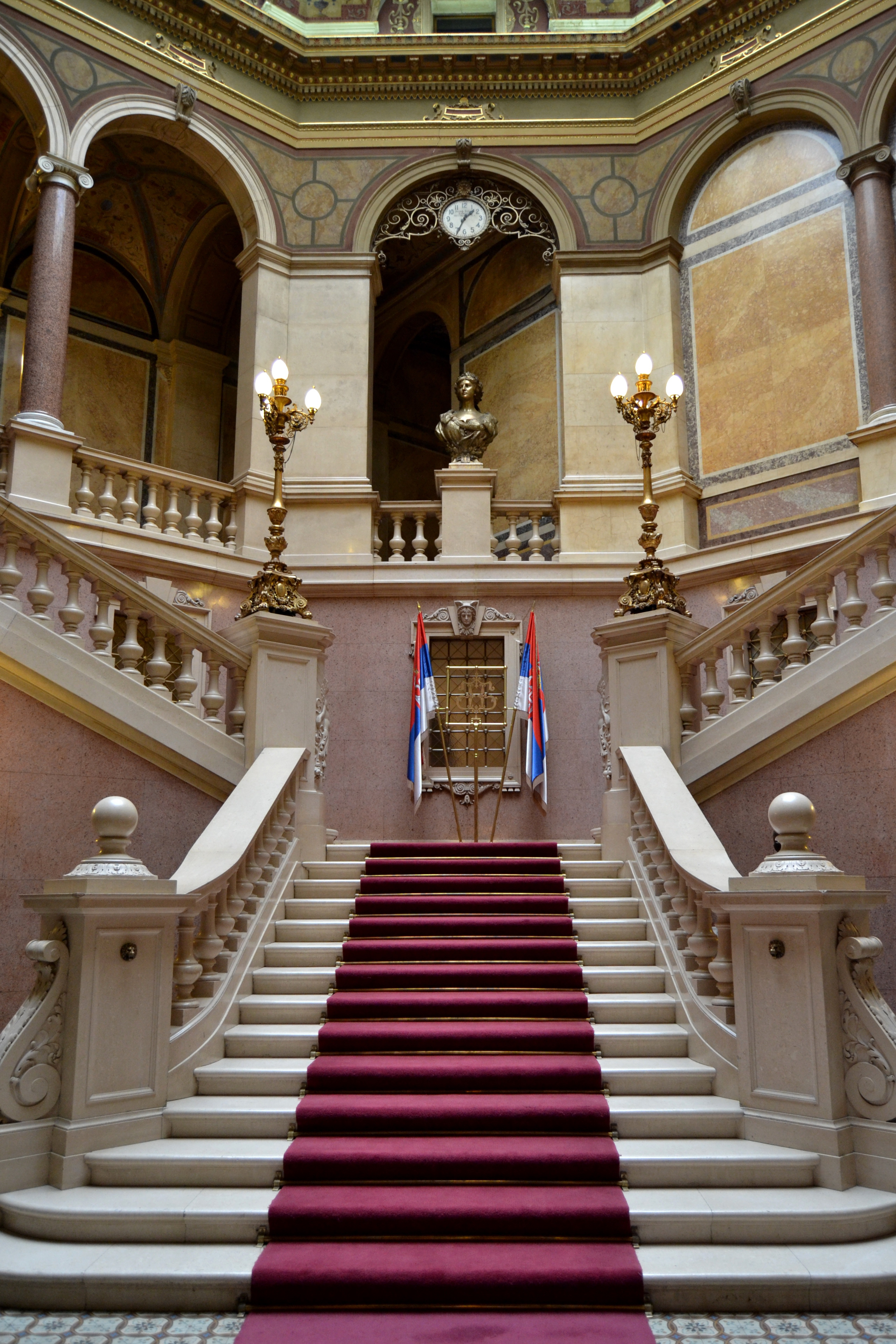 Зграда Народне банке Србије у Улици краља Петра